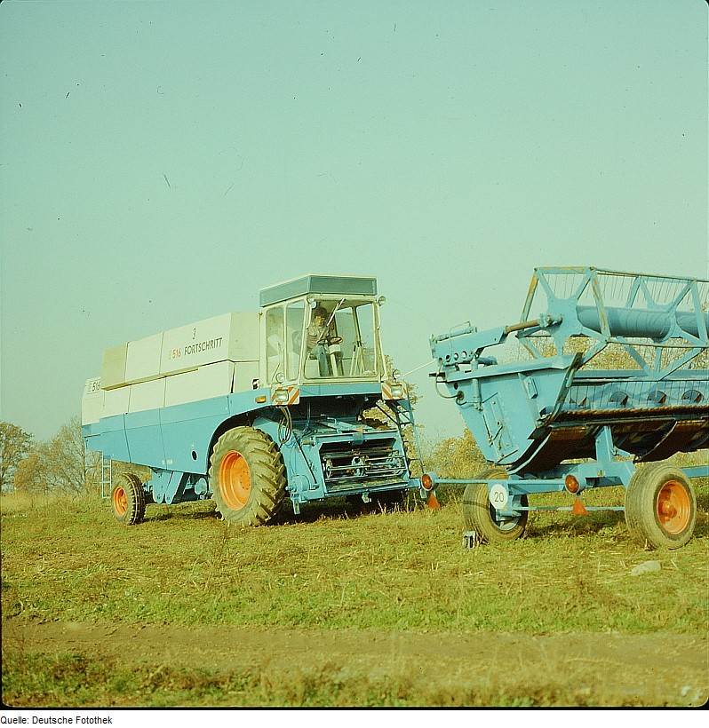 Original image description from the Deutsche FotothekMähdrescher